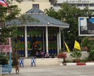 หอประดิษฐานพระพุทธรูปหลวงพ่อสวนกุหลาบ(หลังเก่า) โรงเรียนสวนกุหลาบวทยาลัย รังสิต